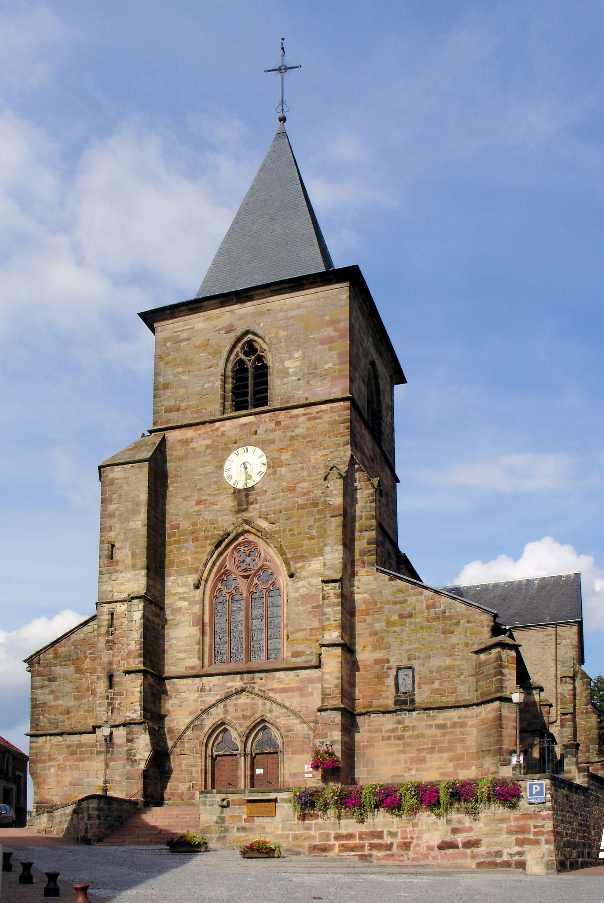 L'Église collégiale Saint-Étienne de Hombourg-Haut (située dans le Vieux-Hombourg).